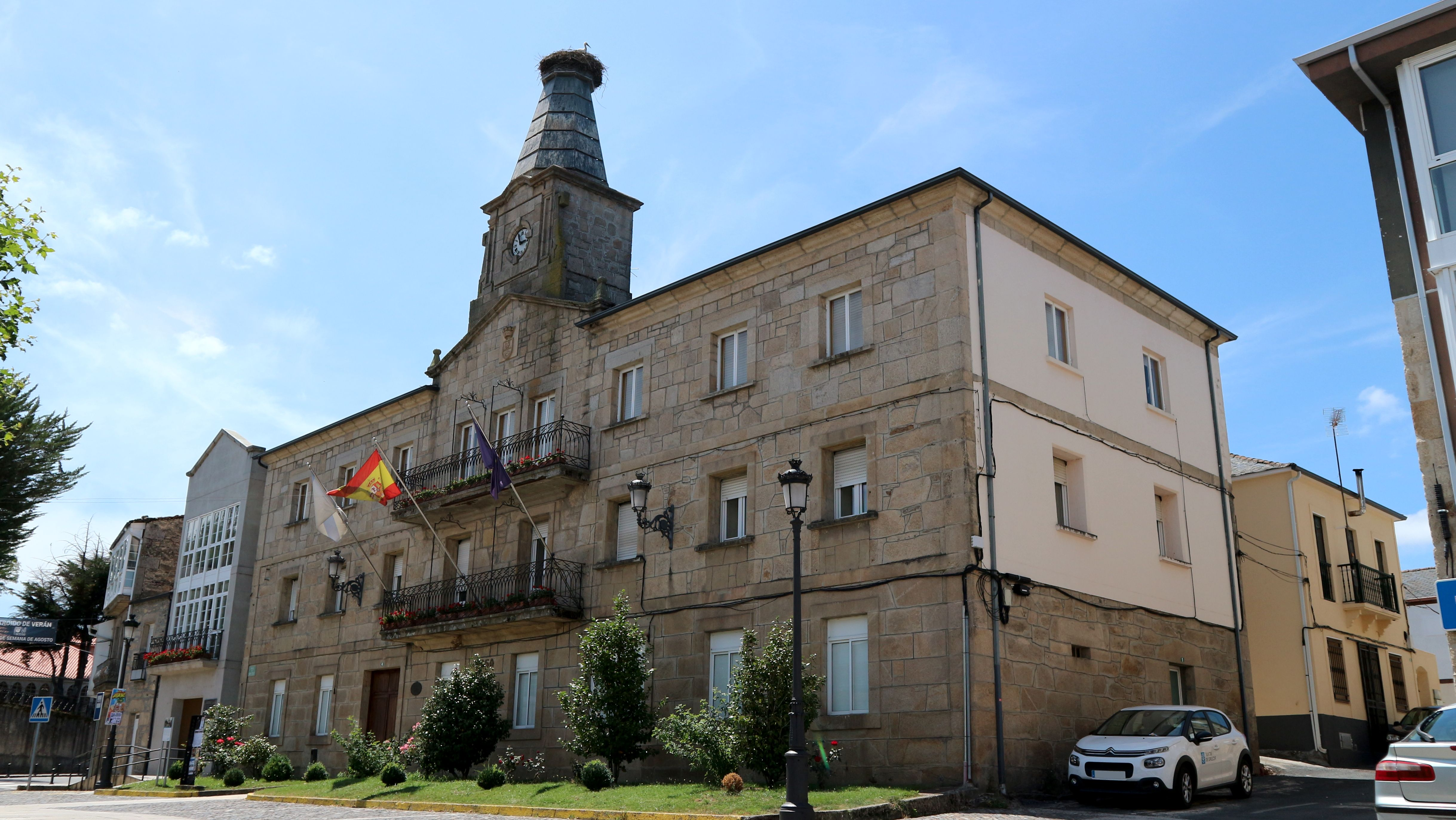 Casa do Concello da Pobra de Trives. A Pobra de Trives.